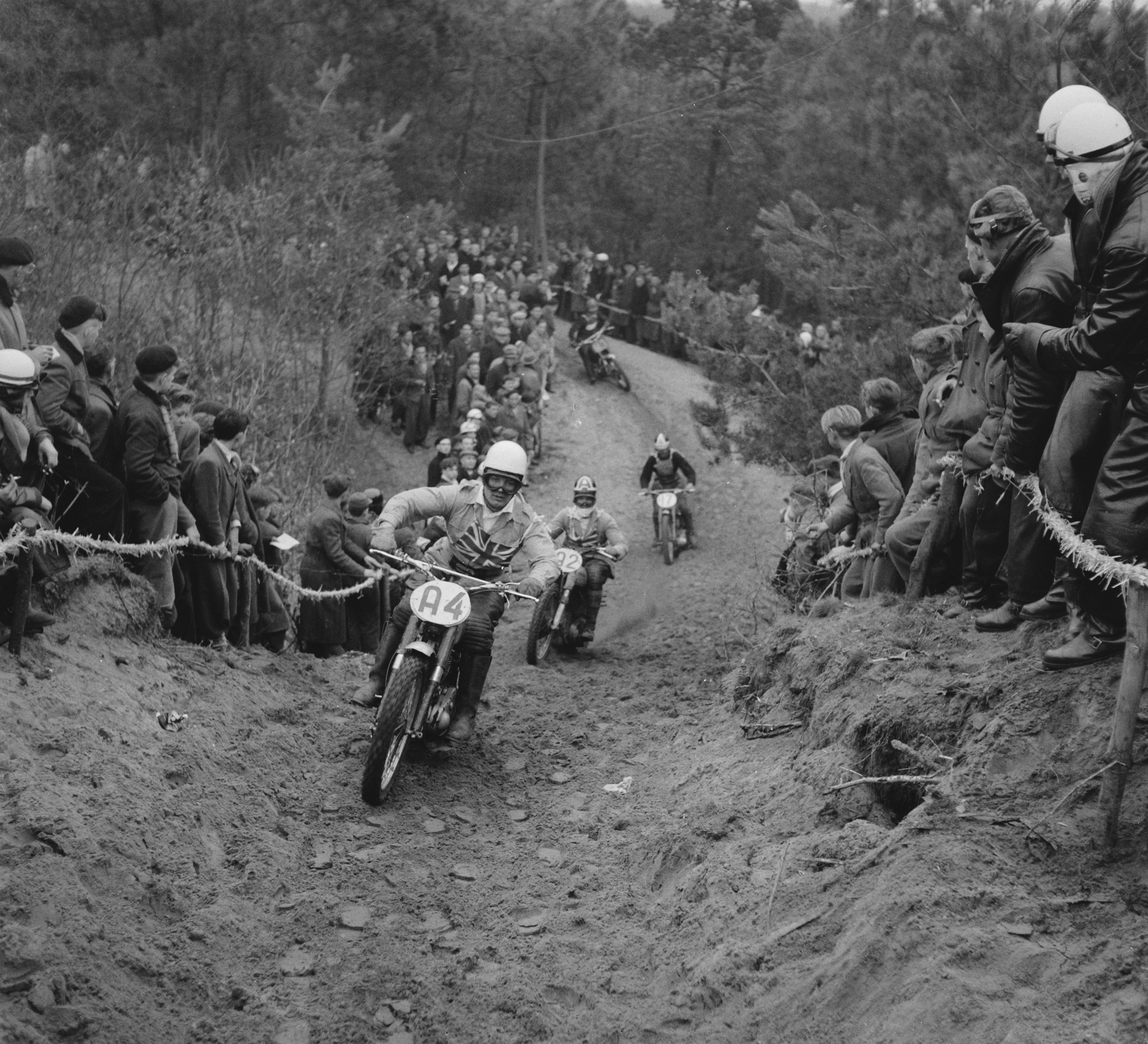 Collectie / Archief : Fotocollectie Anefo Reportage / Serie : [ onbekend ] Beschrijving : Internationale Motor- en terreinwedstrijden te Boekel Datum : 2 april 1956 Locatie : Boekel Trefwoorden : Motoren, terreinwedstrijden Fotograaf : Behrens, Herbert / Anefo Auteursrechthebbende : Nationaal Archief Materiaalsoort : Negatief (zwart/wit) Nummer archiefinventaris : bekijk toegang 2.24.01.03 Bestanddeelnummer : 907-6719